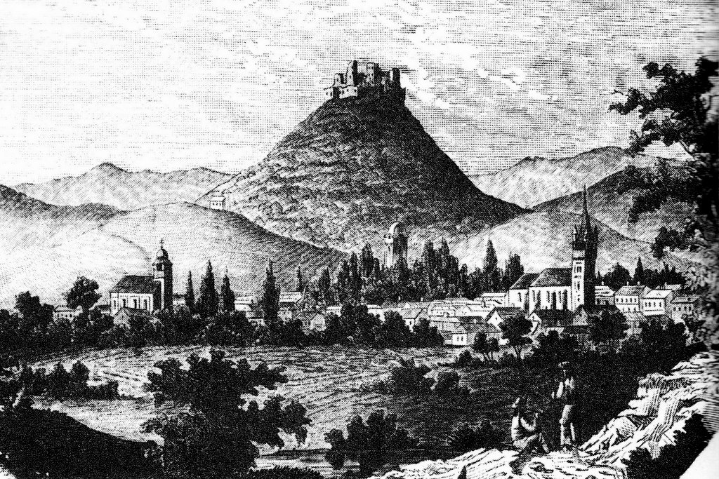 Хустський замок, гравюра